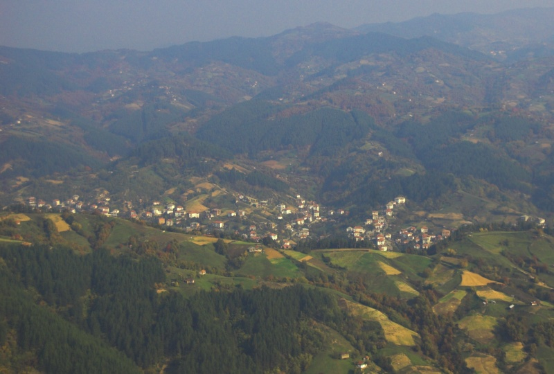 Неделино